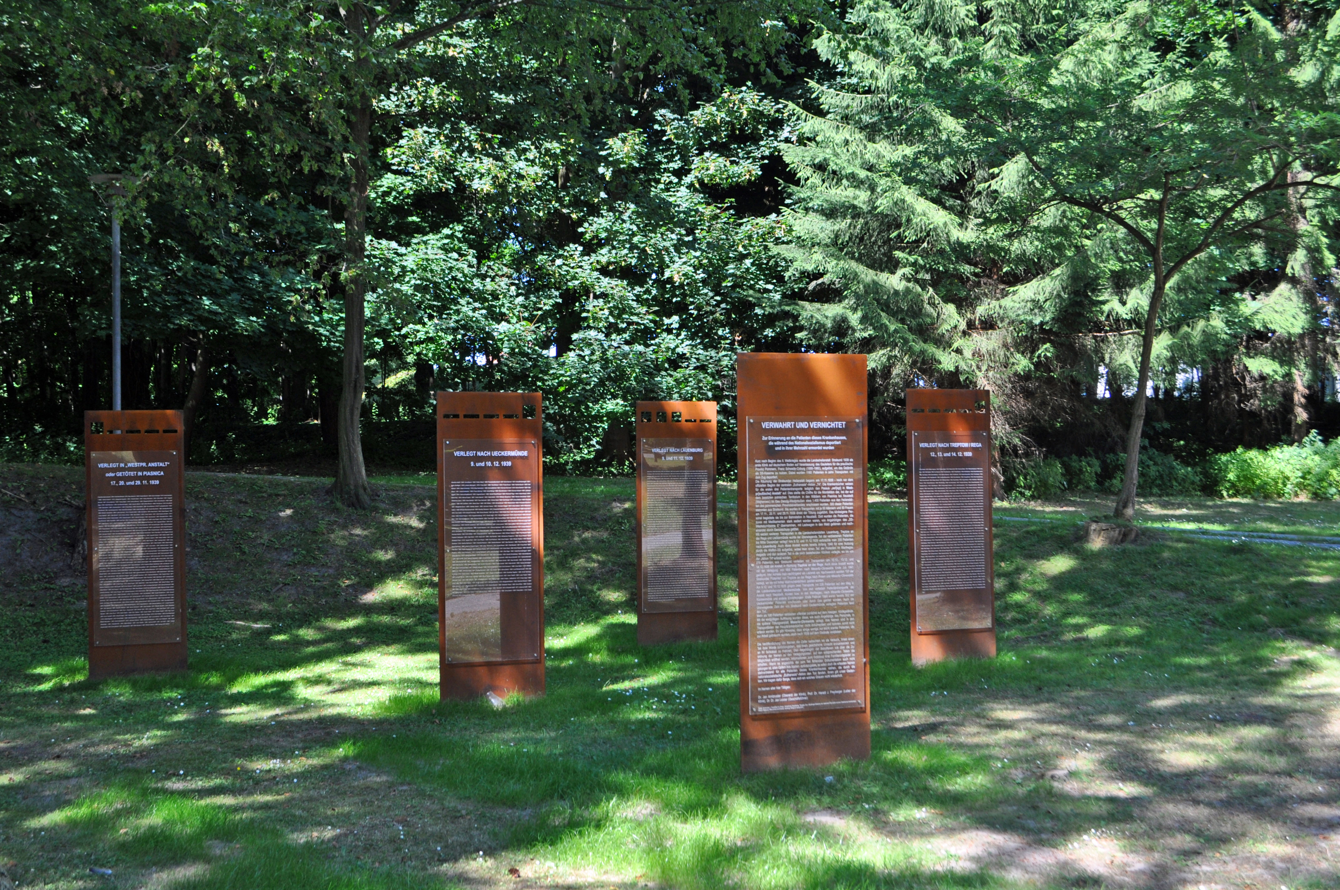 Auf dem Gelände des Krankenhauses "West" (HELIOS Hanseklinikum, West, Rostocker Chaussee 70, in Stralsund). Gedenktafeln für die Opfer der NS-Euthanasie, neben der Klinikumskirche Stralsund. "Am Sonntag, den 2. Juni 2013, enthüllten Geschäftsführer des HELIOS Hanseklinikum Stralsund, Dr. Jan Leister, und Chefarzt der Psychiatrie und Psychotherapie, Prof. Harald Jürgen Freyberger, ein neues Mahnmal, das zum Gedenken der Opfer der „NS-Euthanasie“ erschaffen wurde. Auf dünnen Stahltafeln sind die Namen der im Jahr 1939 über 1100 deportierten und ermordeten Psychiatriepatienten zu lesen. (...) Der rostige Stahl symbolisiere die fortschreitende Aufarbeitung und die dazwischenliegende Zeit des Schweigens. Die kleine Schrift der Namen soll veranlassen, näher an die Tafeln heranzutreten und mit den Opfern in Beziehung zu treten. Die Tafeln mit den Namen der Opfer symbolisieren Transparenz und Zerbrechlichkeit. " (Quelle: Pressemitteilung HELIOS Hanseklinikum Stralsund, 4. Juni 2013)